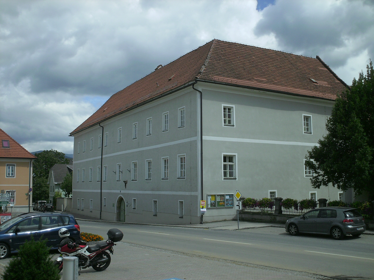 Pfarrhof und Ummauerung in St.Lorenzen/M.